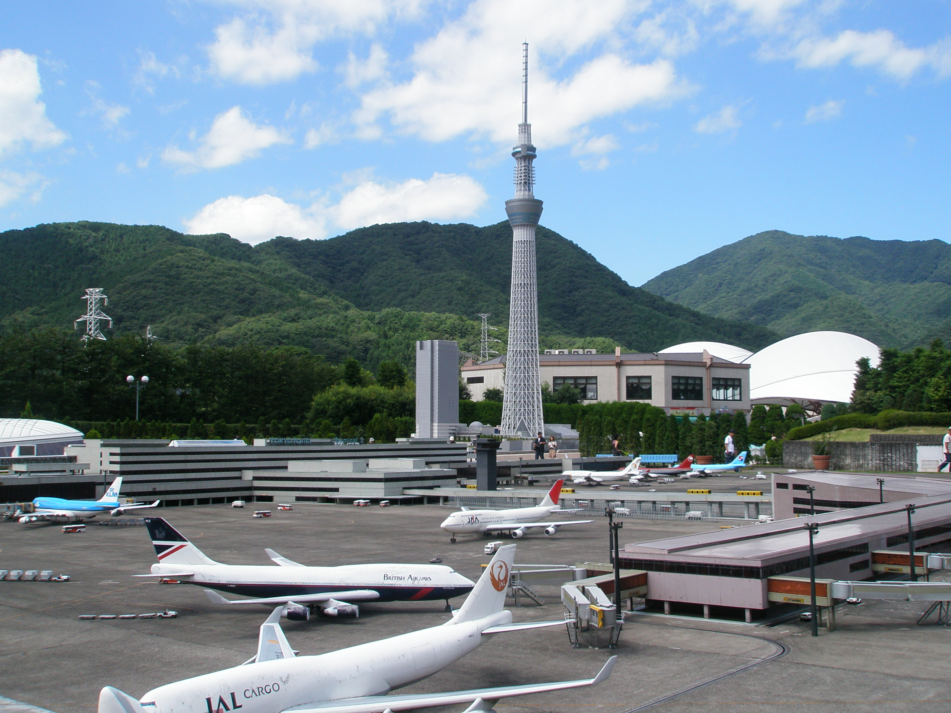 東武ワールドスクエア成田空港と東京スカイツリー